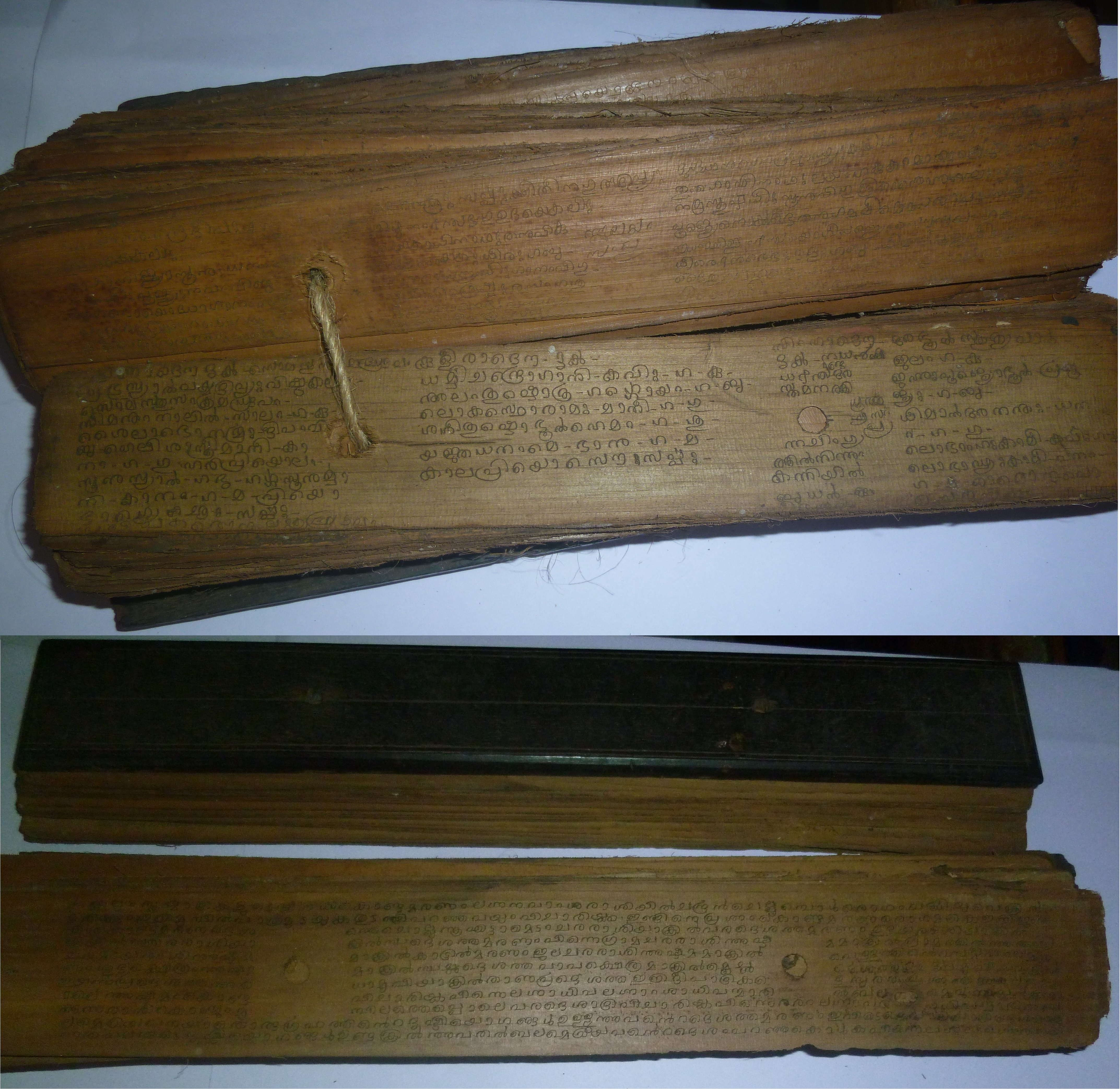 Almost hundred years old palm leaf manuscripts which were used by Ezhuthachan(Kadupattan) for Astrology and Sanskrit teaching. From the collection of Nanu Ezhuthachan Thrissur